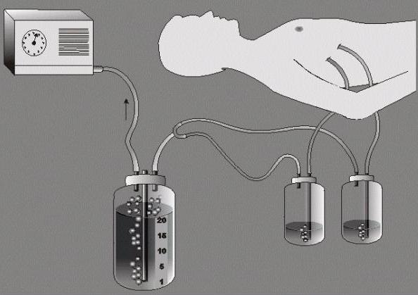 O Sistema de aspiraÃ§Ã£o contÃ­nua possui uma cÃ¢mara de tranrmissÃ£o de pressÃ£o negativa que Ã© regulÃ¡vel por mecanismo de sifonagem reversa atravÃ©s de coluna dâ€™Ã¡gua submersa. A cÃ¢mara de transmissÃ£o de pressÃ£o negativa possibilita uma transmissÃ£o de aspiraÃ§Ã£o moderada (graduada) ao sistema de drenagem pleural ou mediastinal.